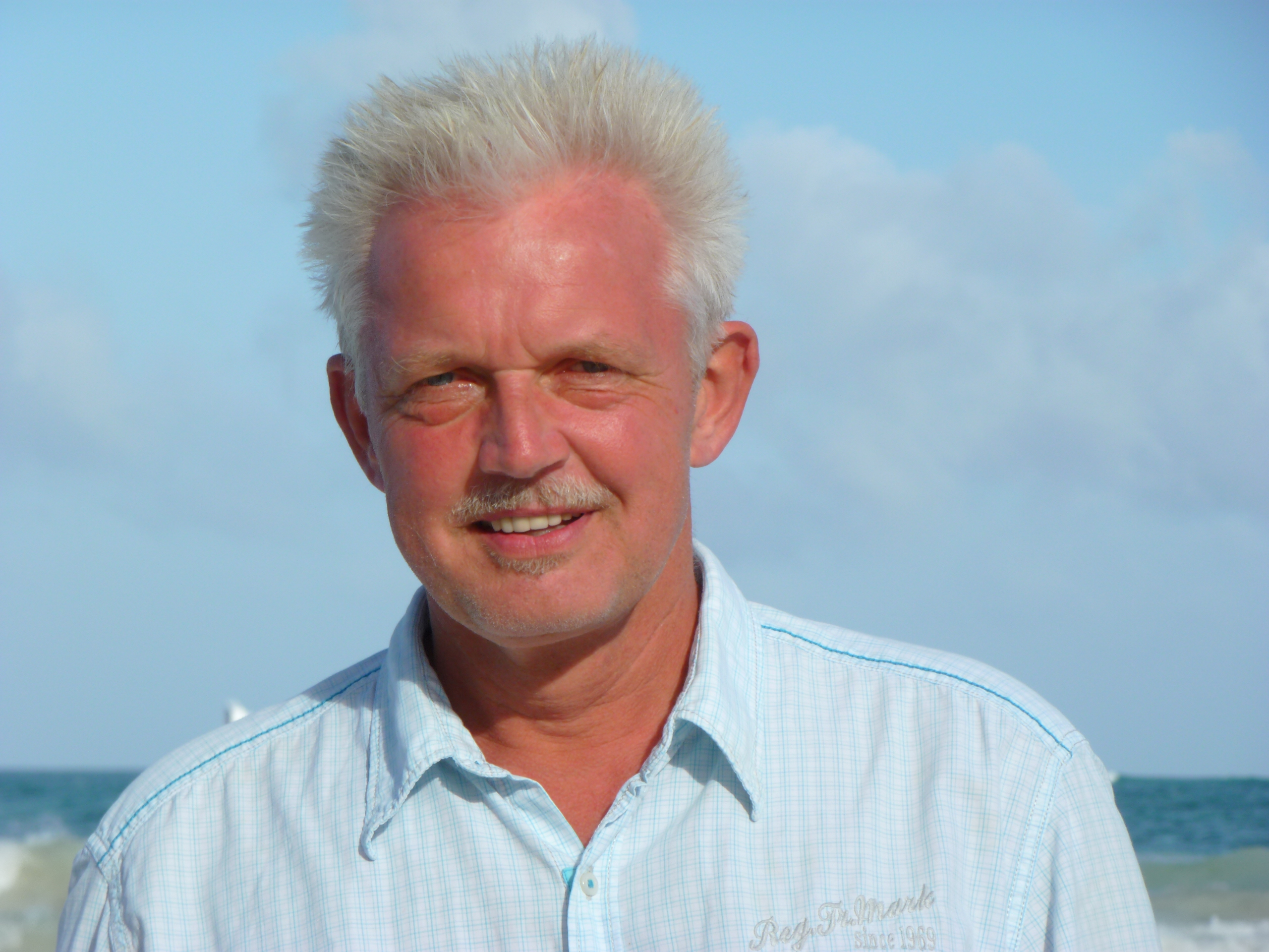 Foto des Dokumentarfilmers Joachim Hinz